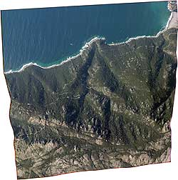 Image numérique aérienne orthorectifiée